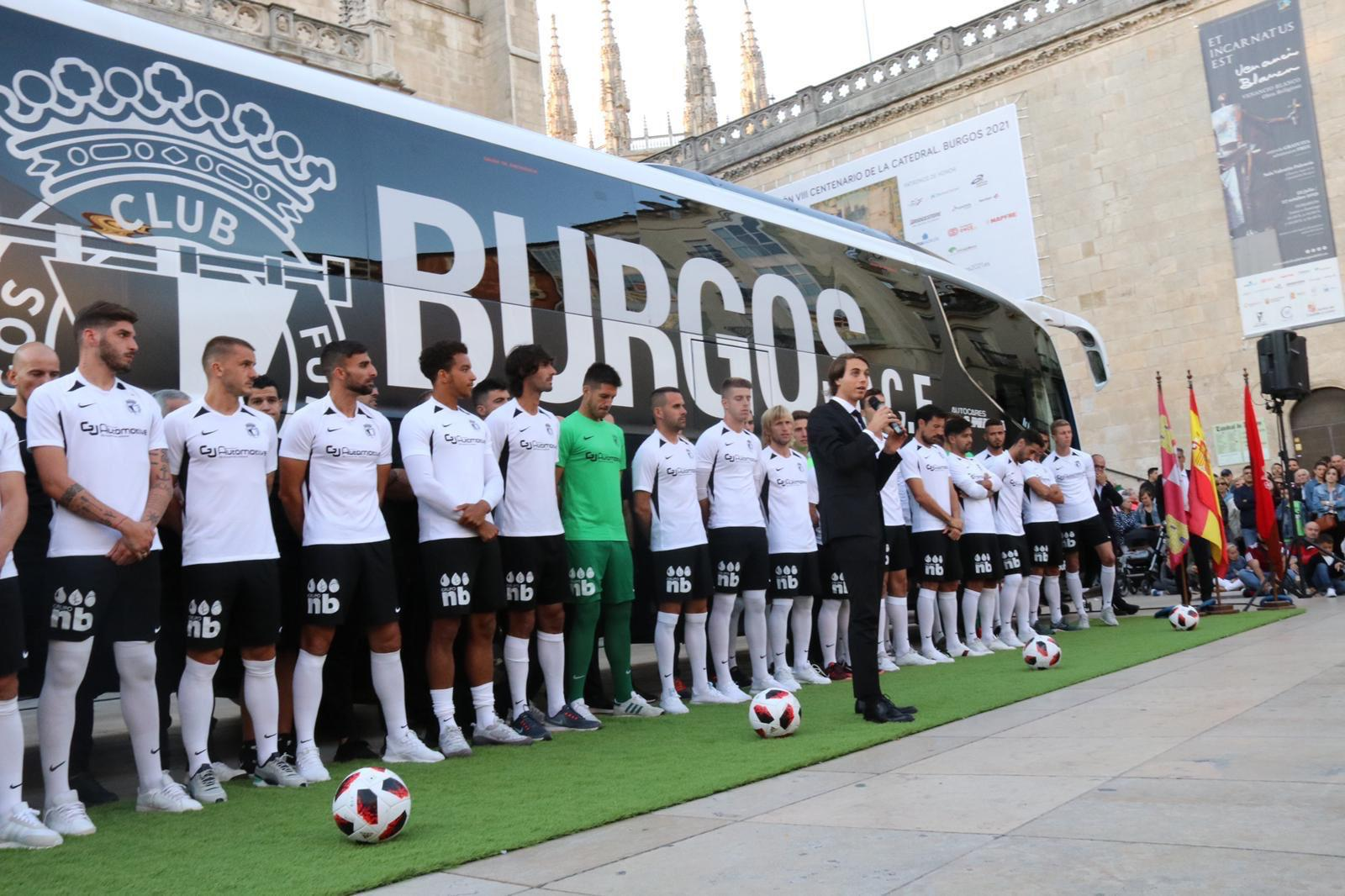 Franco Caselli da un discurso en la presentación de la temporada 2019-2020 en la Catedral de Burgos